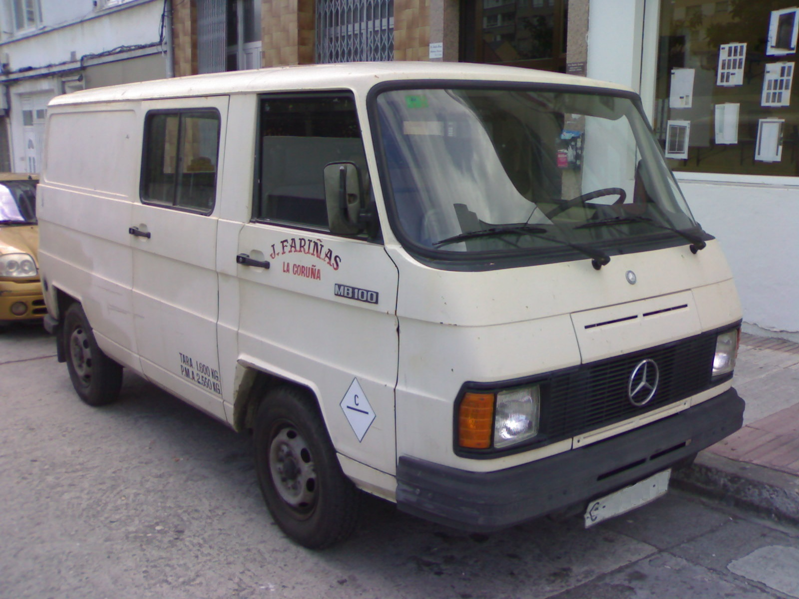 Mercedes-Benz MB 100 de la primera generación (1981-1987).